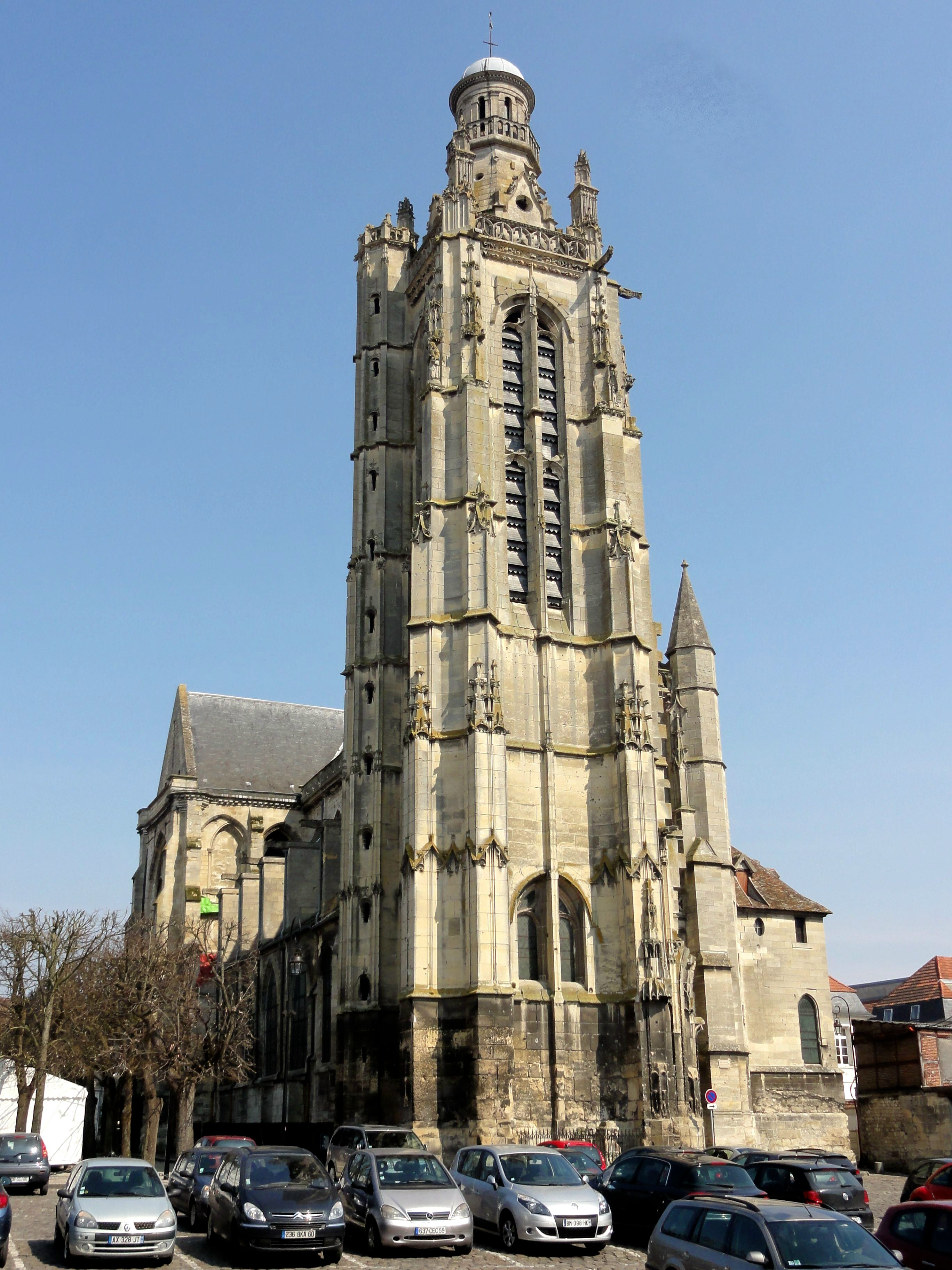 Façade occidentale.